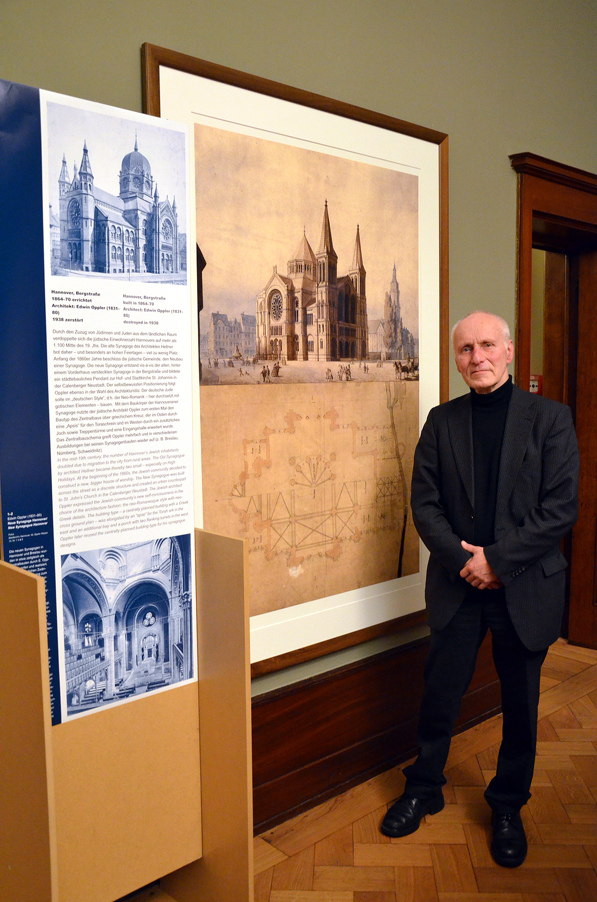 Professor Harmen Thies in der Villa Seligmann vor Archivalien-Reproduktionen des Stadtarchivs Hannover zur ehemaligen Neuen Synagoge von Edwin Oppler ...